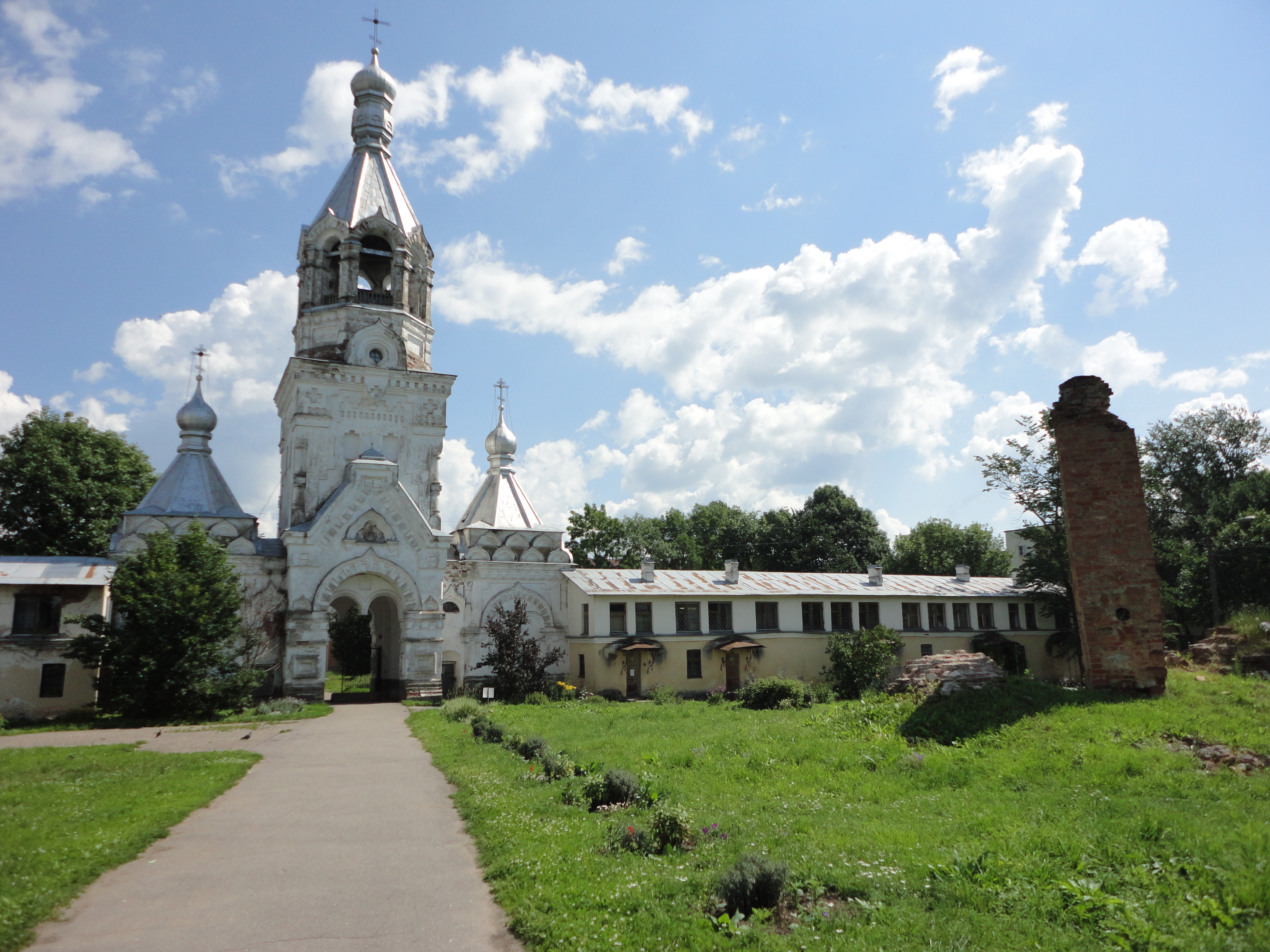 Монастырь Десятинный: улица Десятинная, 18, Великий Новгород, Новгородская область